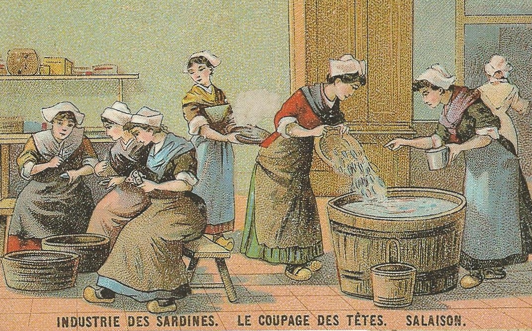 L'industrie des sardines : le coupage des têtes et la salaison (dessin, "Cours élémentaire de Géographie" par Rogie et Despiques, F. Juven, 1908)